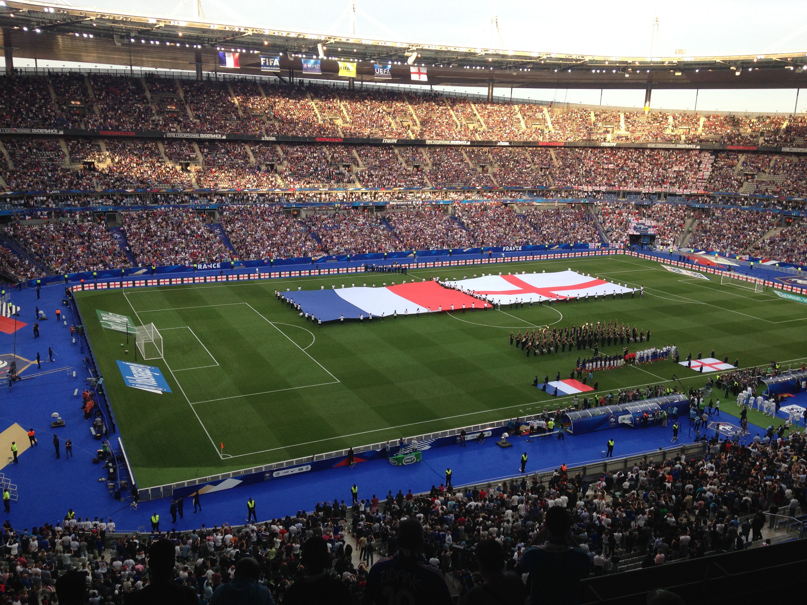 Drapeaux au Stade De France pour France Angleterre